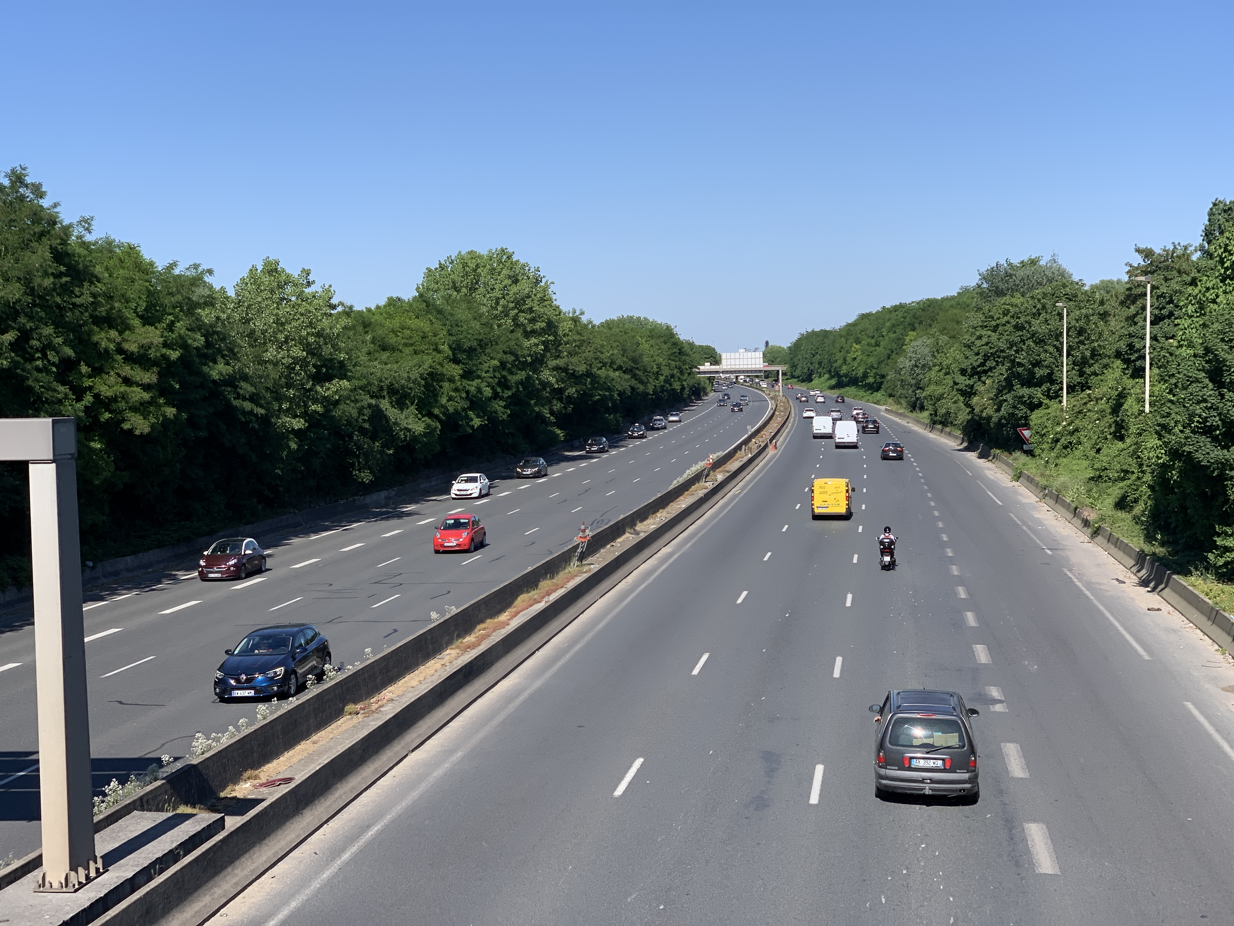 L'autoroute A104 vue depuis le pont de l'avenue Paul Vaillant-Couturier, Villepinte, Seine-Saint-Denis.